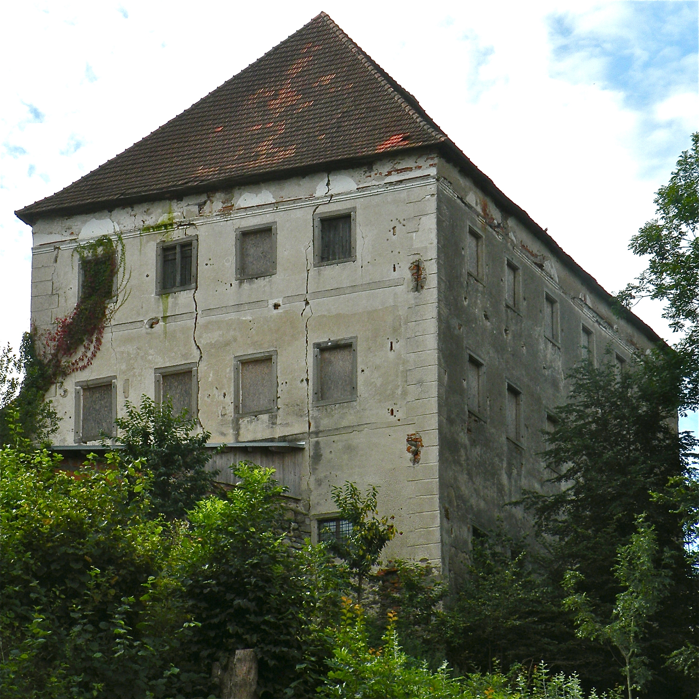 Schloss Arbing in Arbing im Bezirk Perg in Oberösterreich